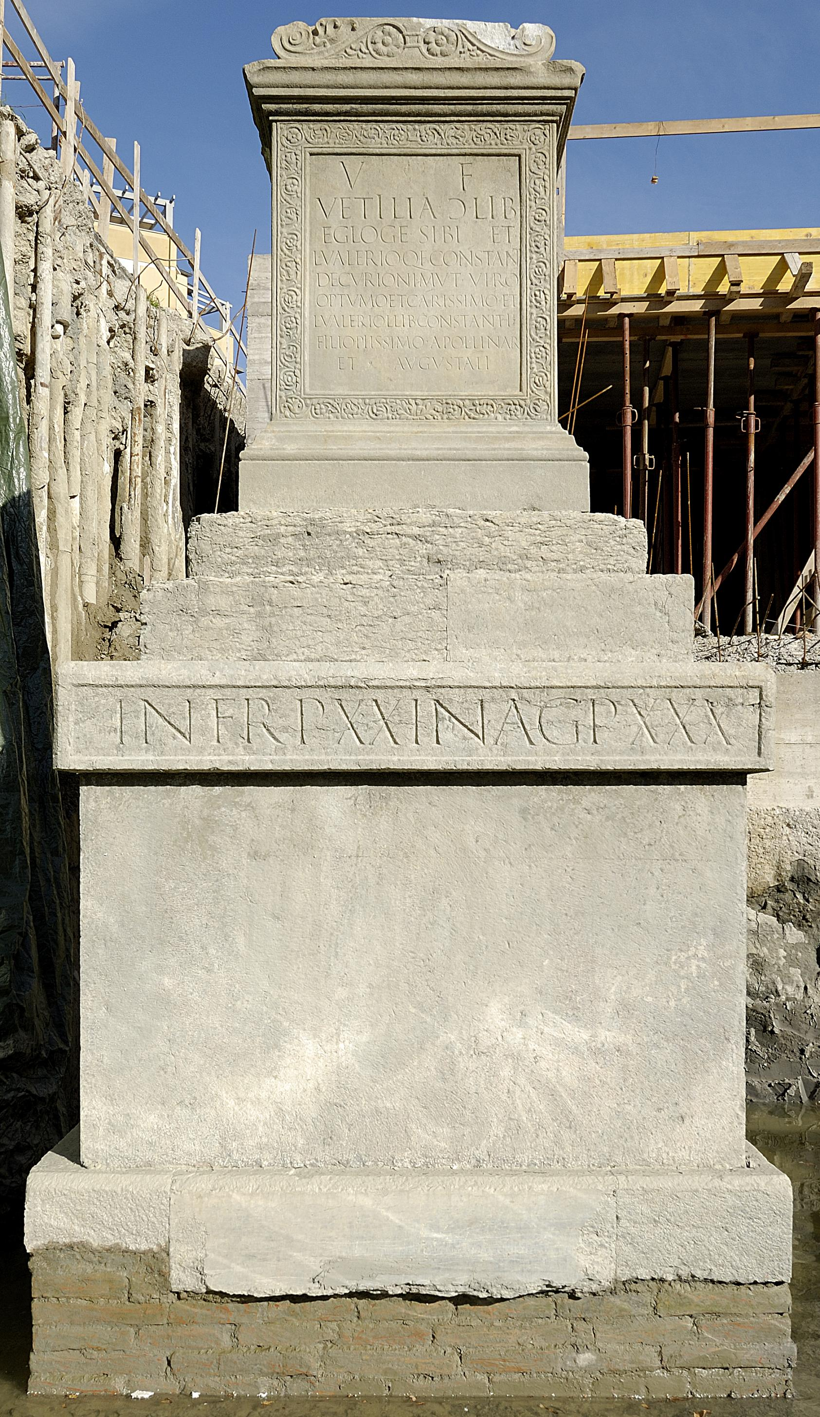 Ara di Vetilia Egloge, ritrovata nel 2007 nell'area della necropoli romana ad oriente di Modena. AE 2008, 535: V(iva) f(ecit) / Vetilia Ↄ(mulieris) liberta / Egloge sibi et / L(ucio) Valerio Q(uinti) l(iberto) Constant(i) / decurioni Mut(inae) viro / opt mo et carissimo fil(io) / L(ucio) Valerio L(uci) lib(erto) Constanti / filio piissimo Apollinar(i) / et Augustali // In fr(onte) p(edes) XXI in a(gro) p(edes) XXX